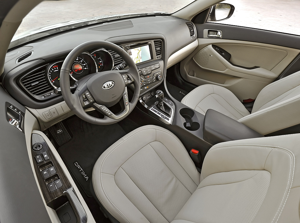 kia optima interior